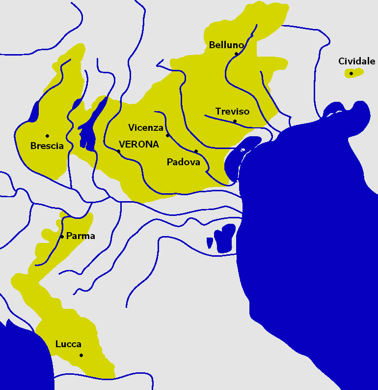 Territori controllati dalla Signoria veronese degli Scaligeri nel 1336, nel momento di massima espansione.